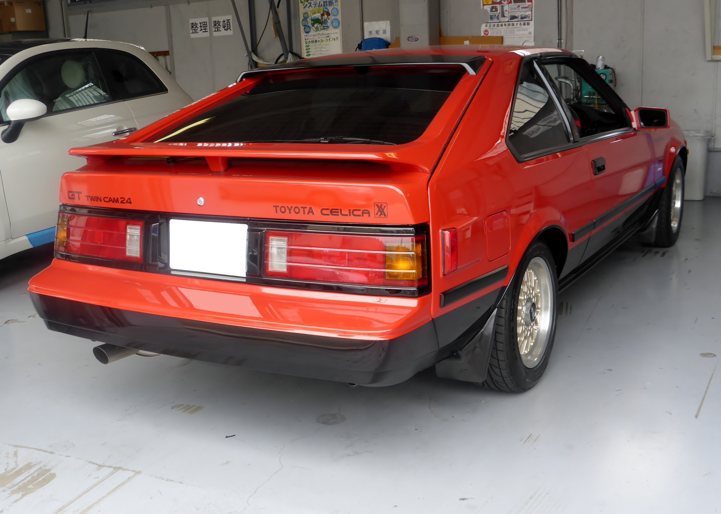 A60型トヨタ・セリカXX 2.0GTをリアから撮影。